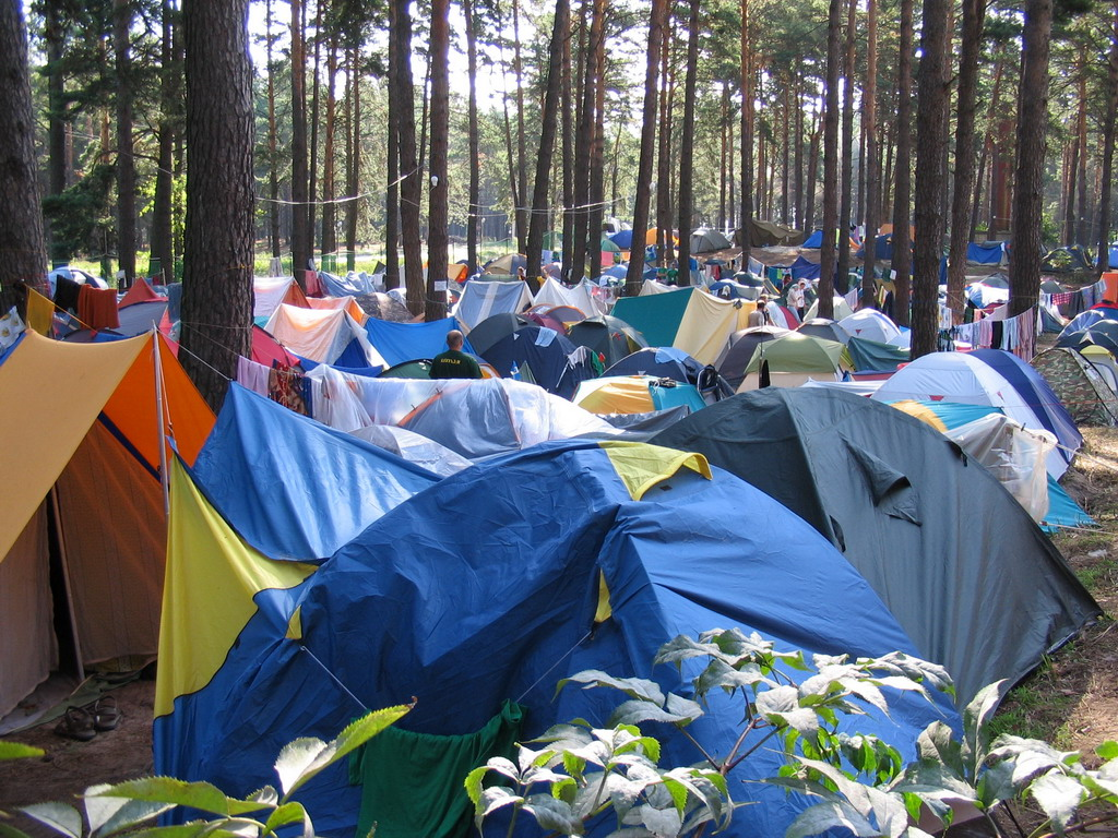 Палаточный лагерь фестиваля Bratia.UA близ села Глебовка Киевской области